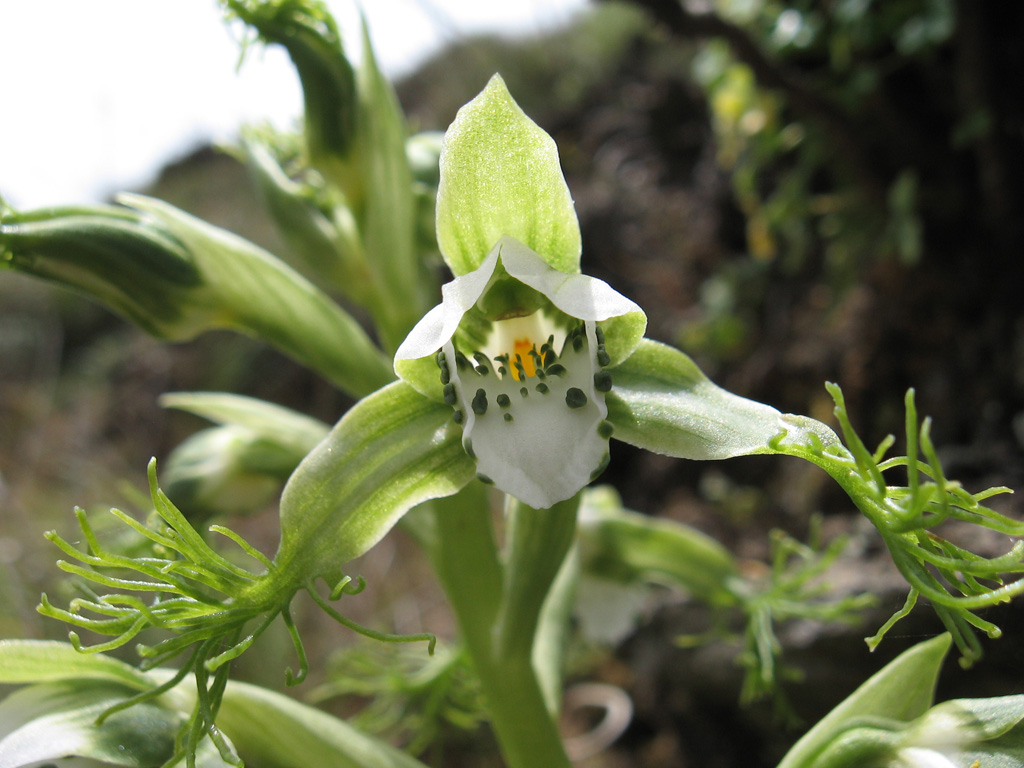 Orquídea Bipinnula fimbriata